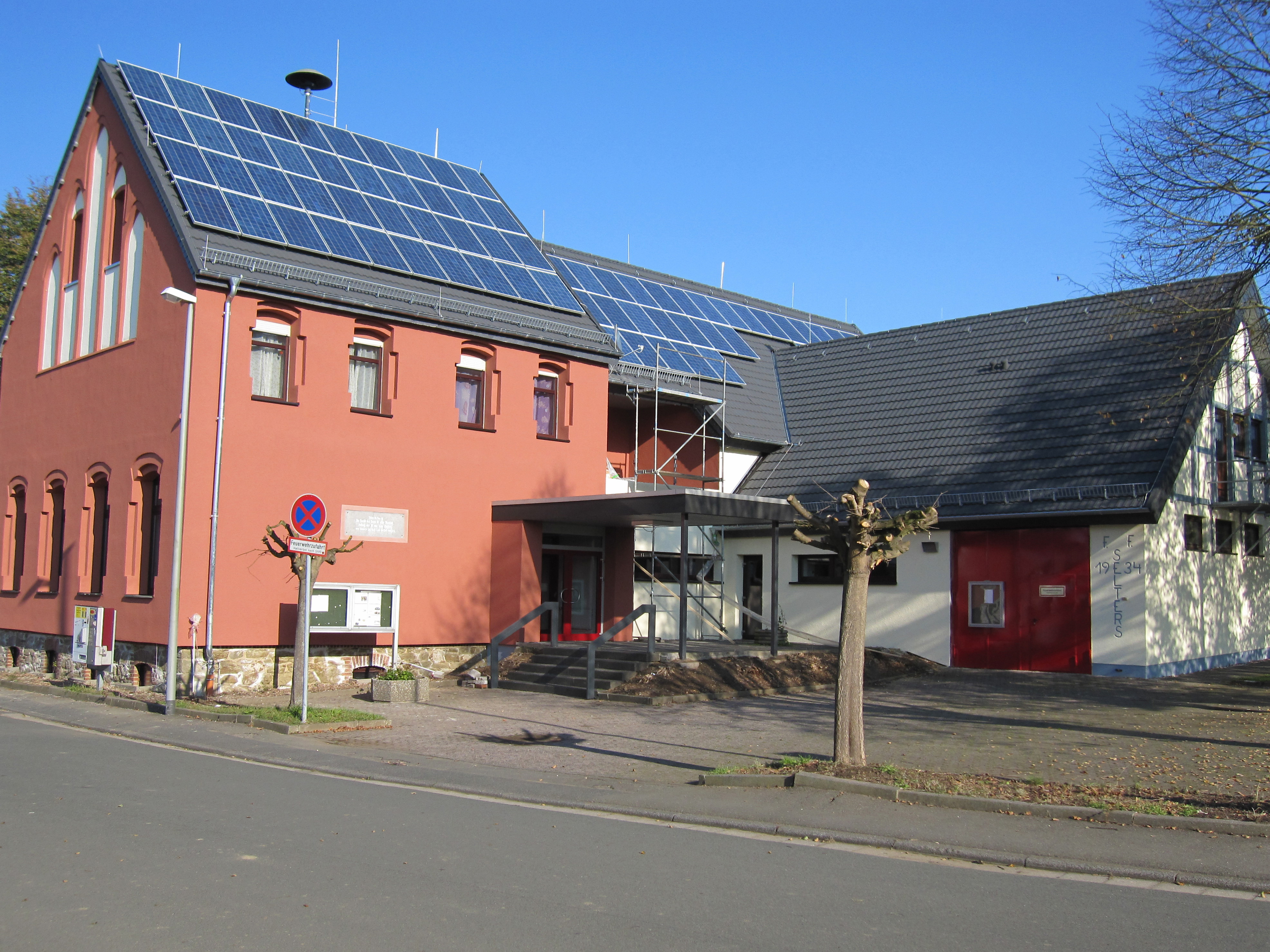 Dorfgemeinschaftshaus und Freiwillige Feuerwehr von Löhnberg-Selters